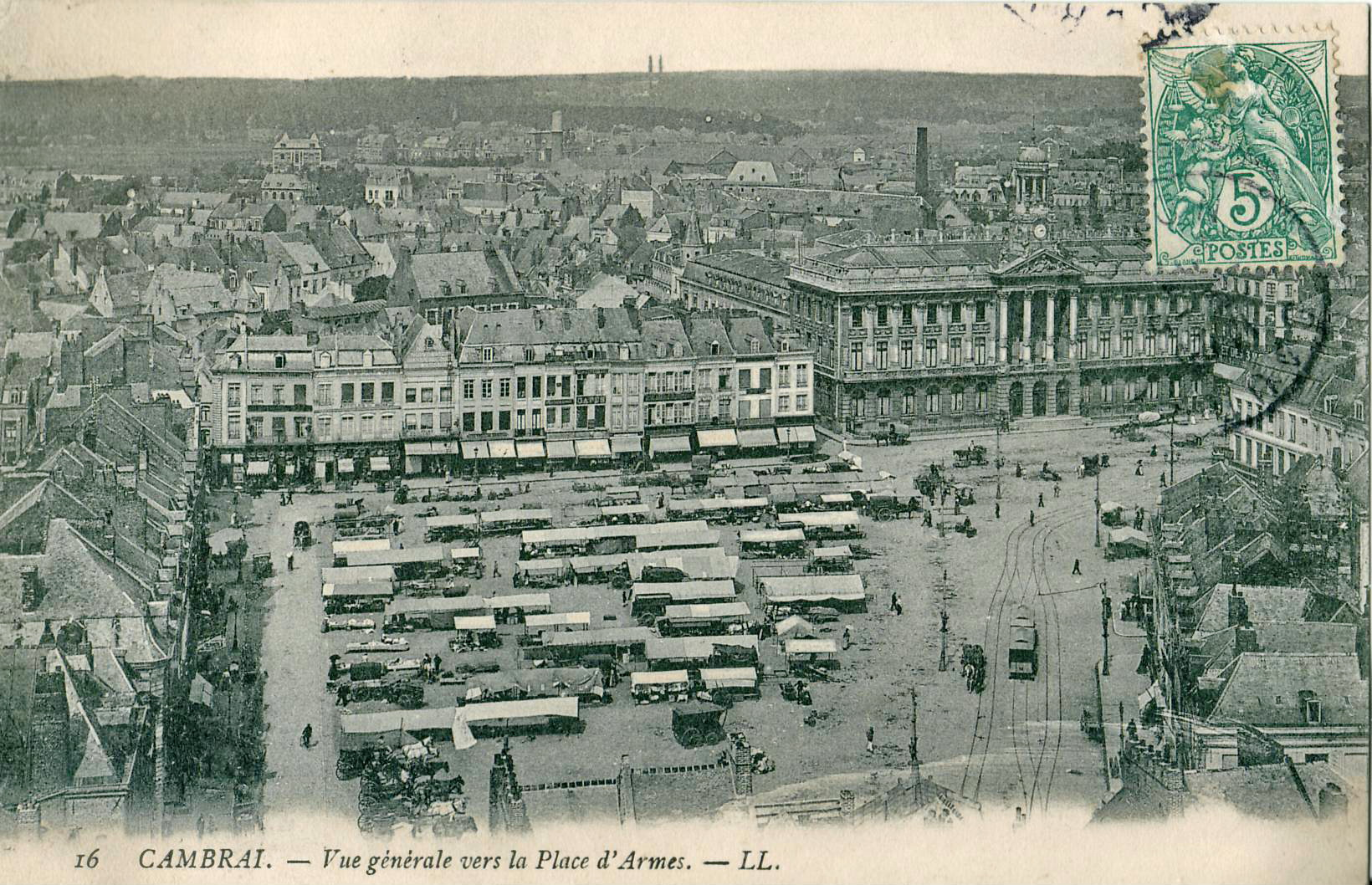 Carte postale ancienne éditée par LL, N°16Cambrai : Vue générale vers la Place d'ArmesA gauche du cliché, le marché, à droite, la gare du tramway.